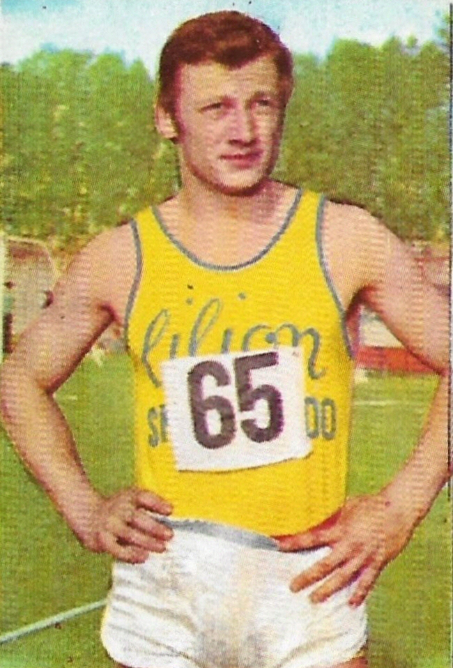 Angelo Sguazzero nel 1967